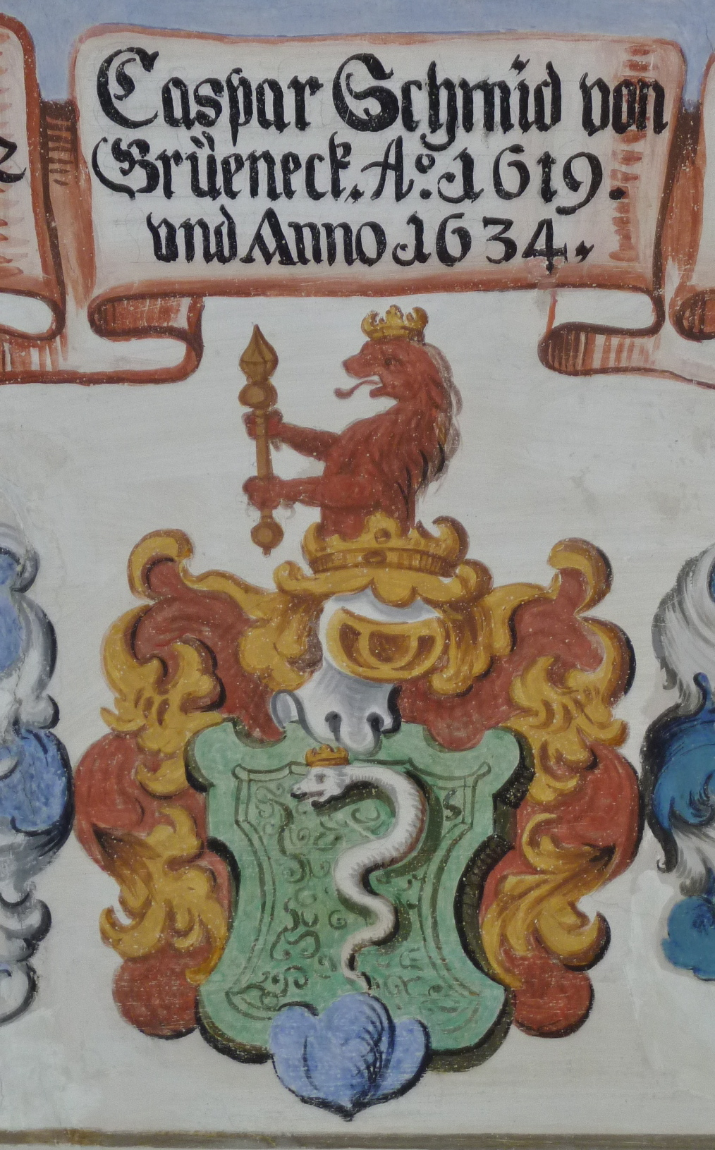 Cuort Ligia Grischa Wappen Schmid von Grüneck